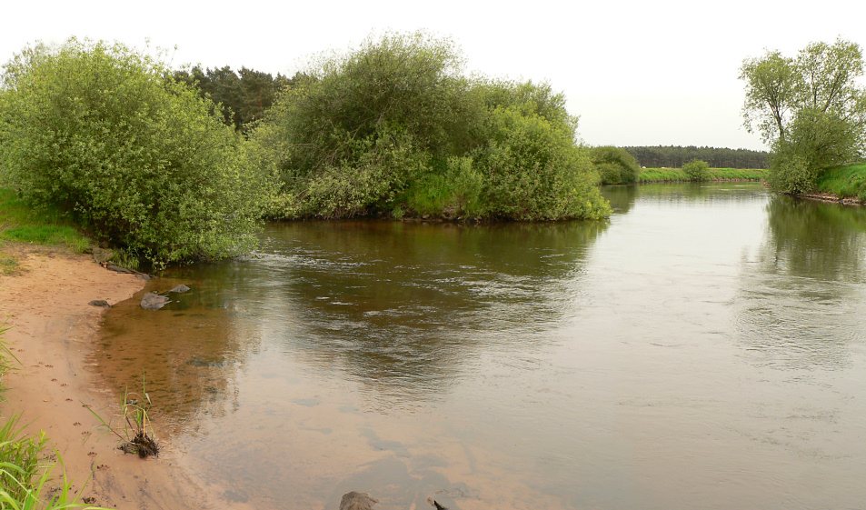 Örzte_Mündung_Aller.jpg